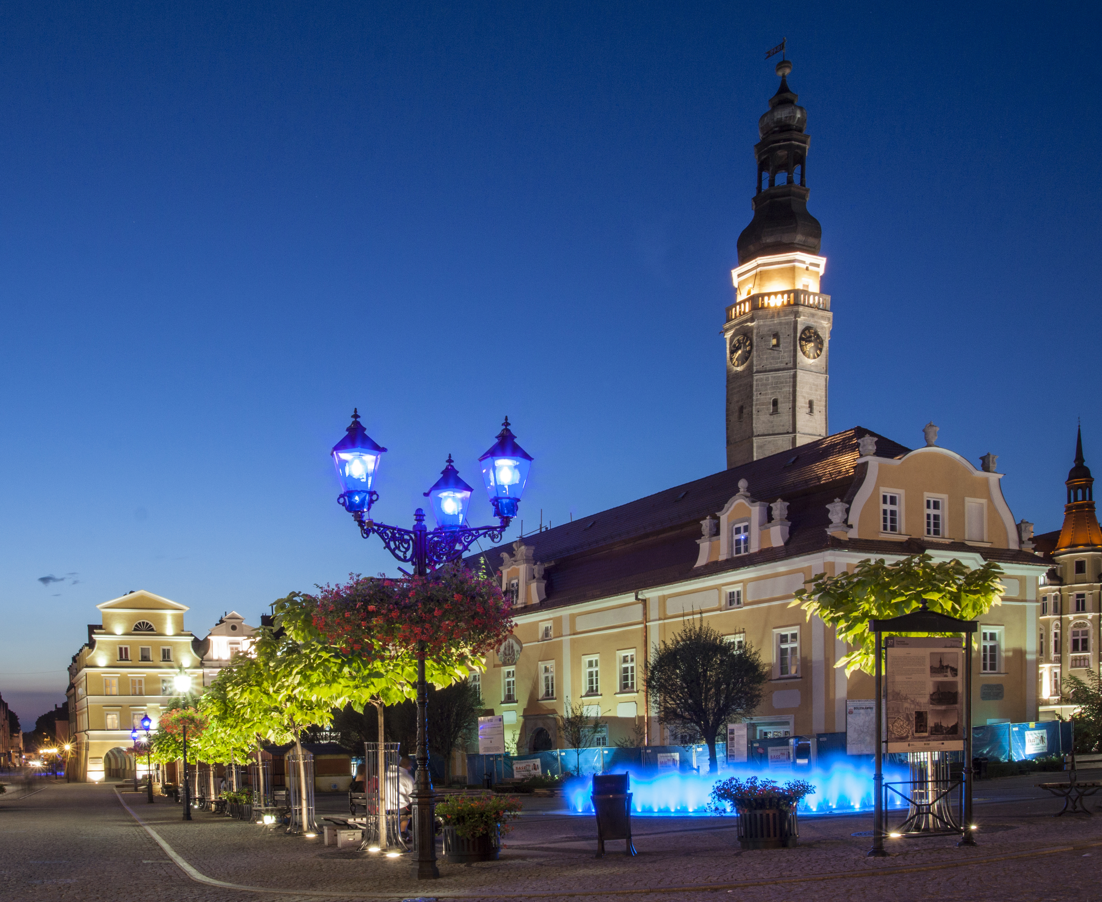 Bolesławiec Rynek 41 - Ratusz, 1525, 1781